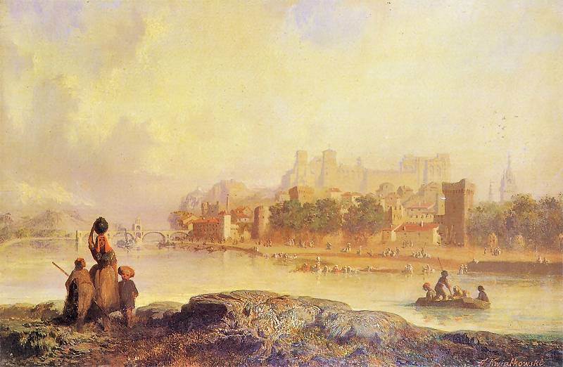 Avignon Landscape, 1850